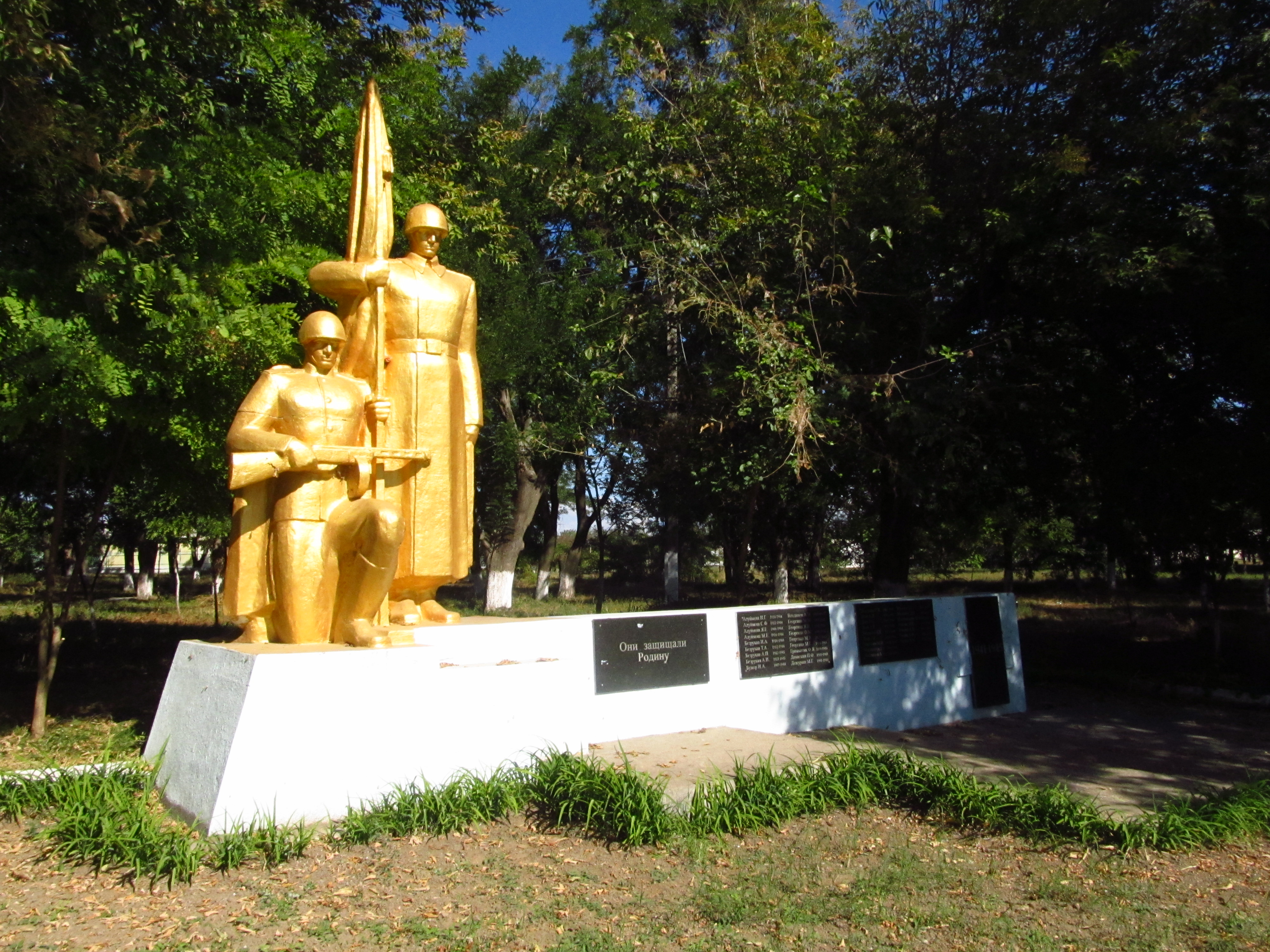 Пам’ятник воїнам-односельцям,загиблим в роки Великої Вітчизняної війни., Багате, біля клубу